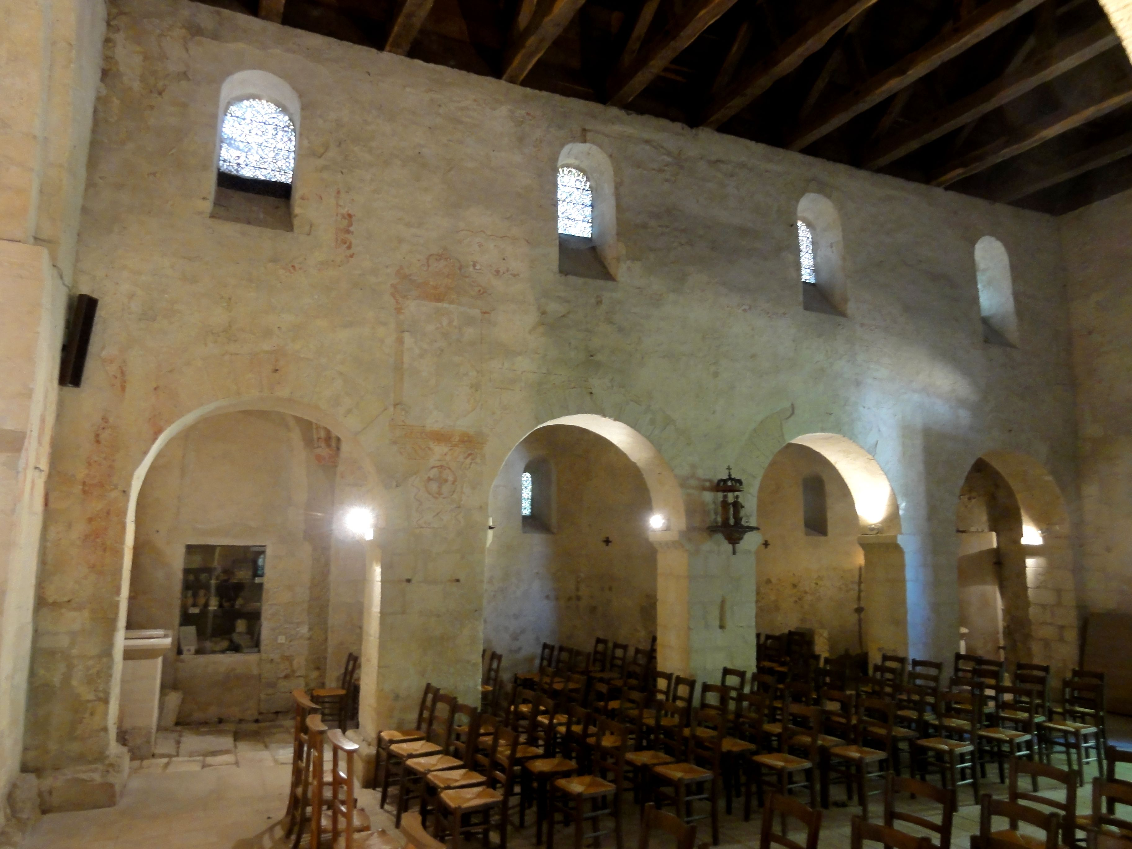 Nef, élévation sud.